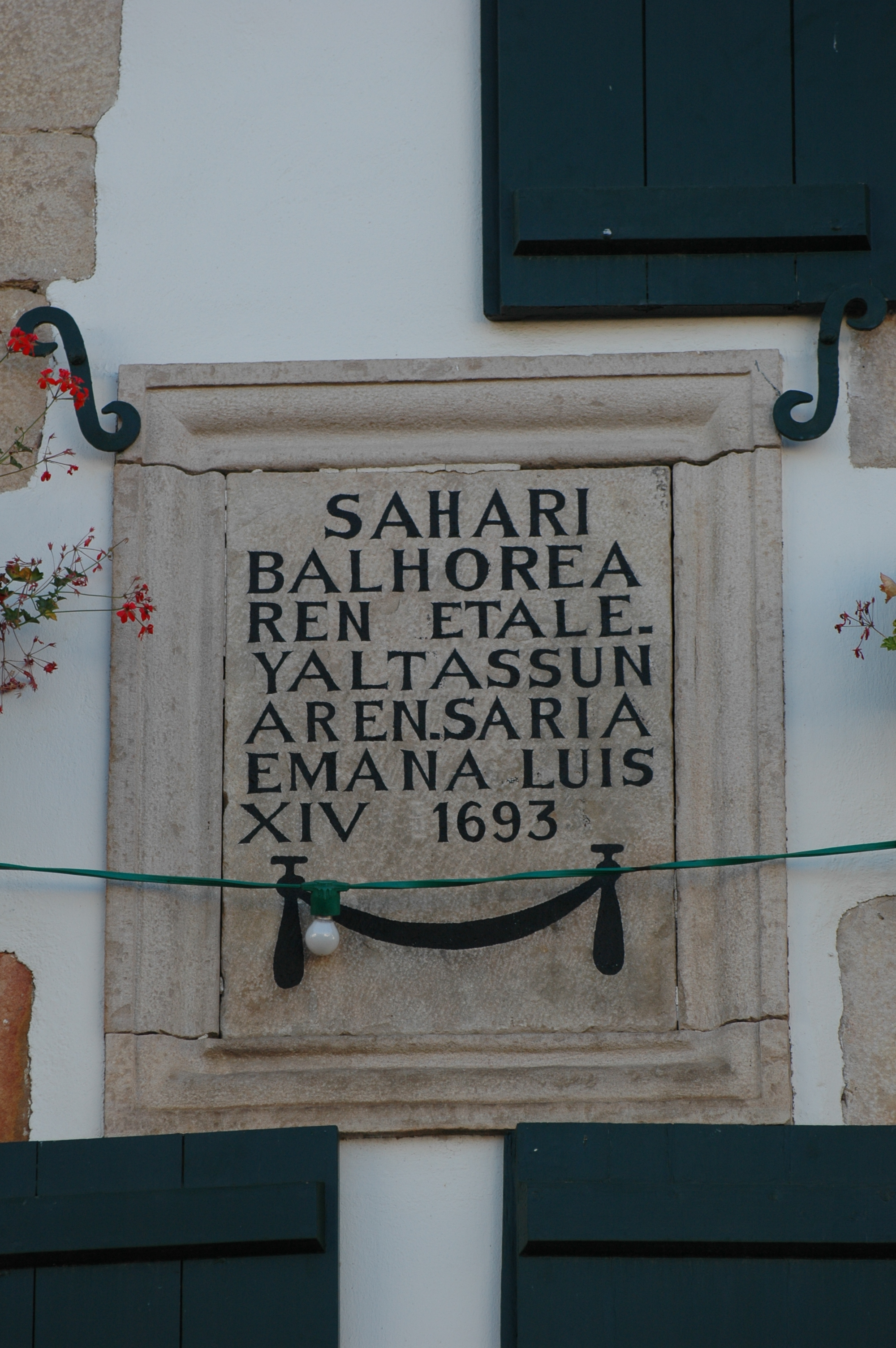 Sare, plaque commémorative de 1693